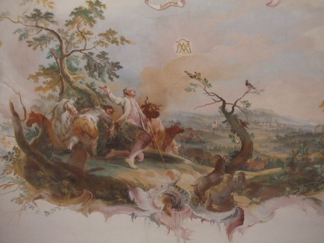 Wallfahrtskirche Maria zum Berge Karmel, (Meersburg-)Baitenhausen, Bodenseekreis; Deckengemälde